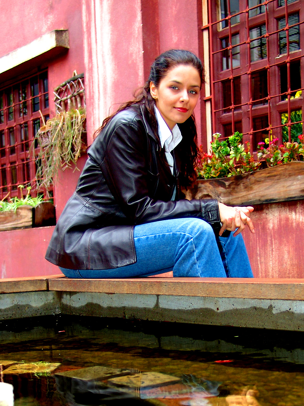 Bianca Rinaldi